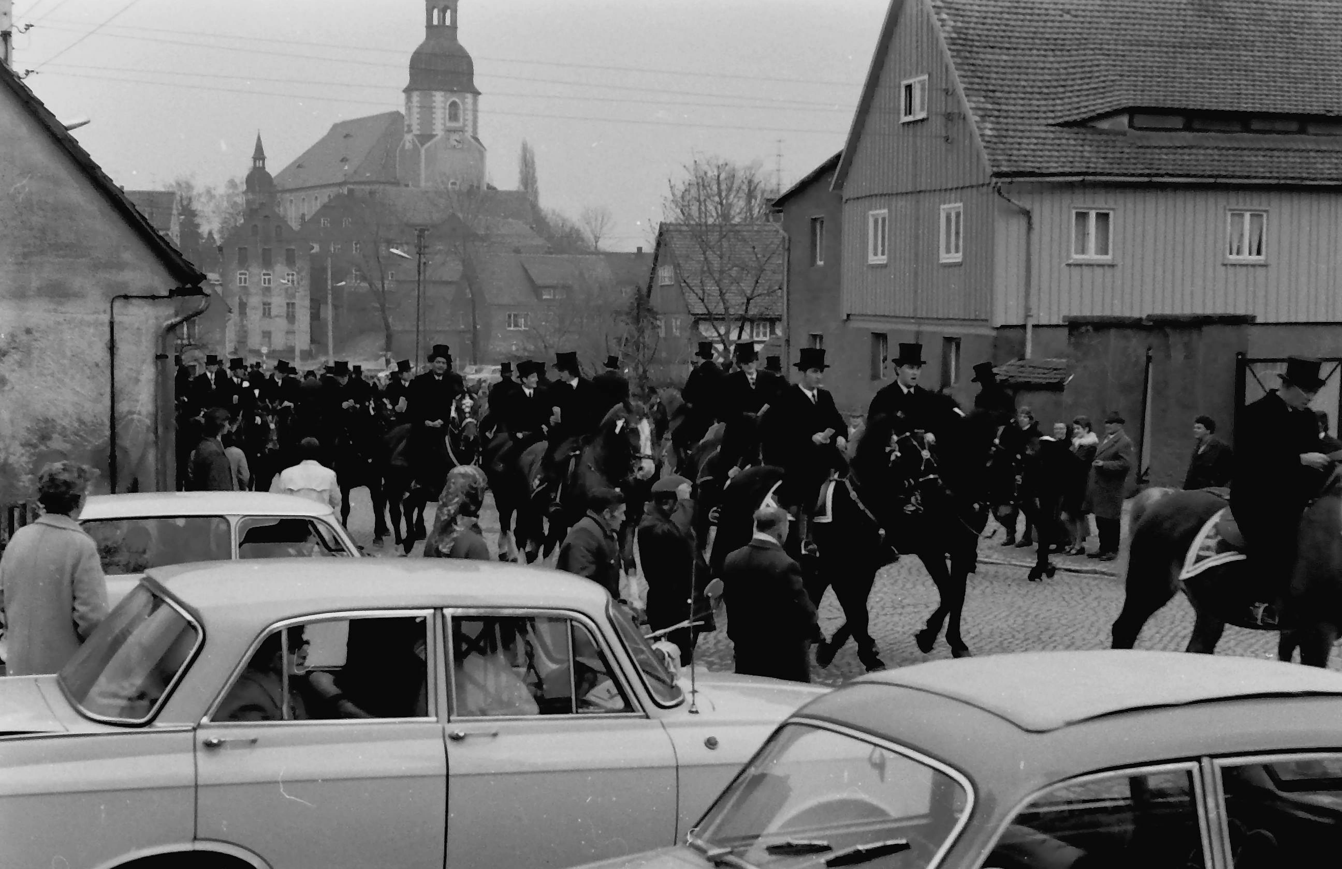 Hornjoserbsce: Křižerjo w Chrósćicach, 1971